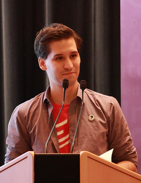 Jerry Weyer at Landeskongress 2011